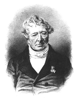 Jacques Joseph Champollion-Figeac Jacques Joseph Champollion-Figeac